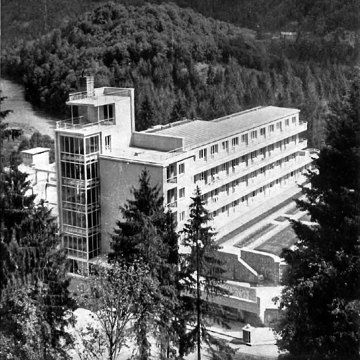 Żegiestów, hotel-pensjonat „Wiktor”; 1934, modernistyczny, arch. Jan Bagieński i Zbigniew Wardzała